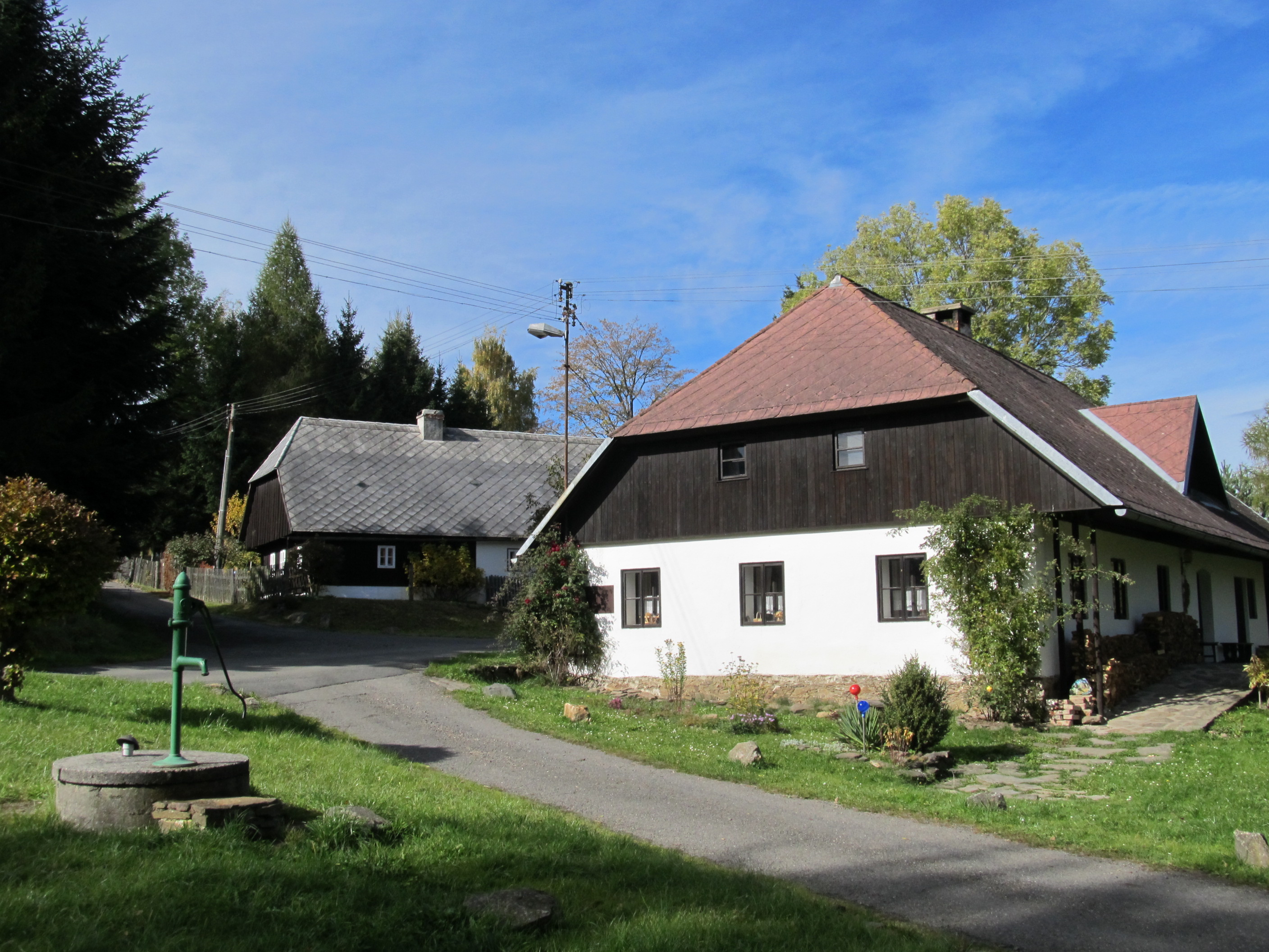 Hořejší Těšov